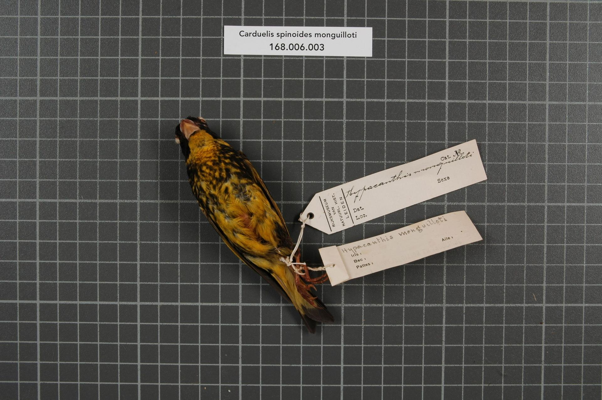 Carduelis spinoides monguilloti (Delacour, 1926)